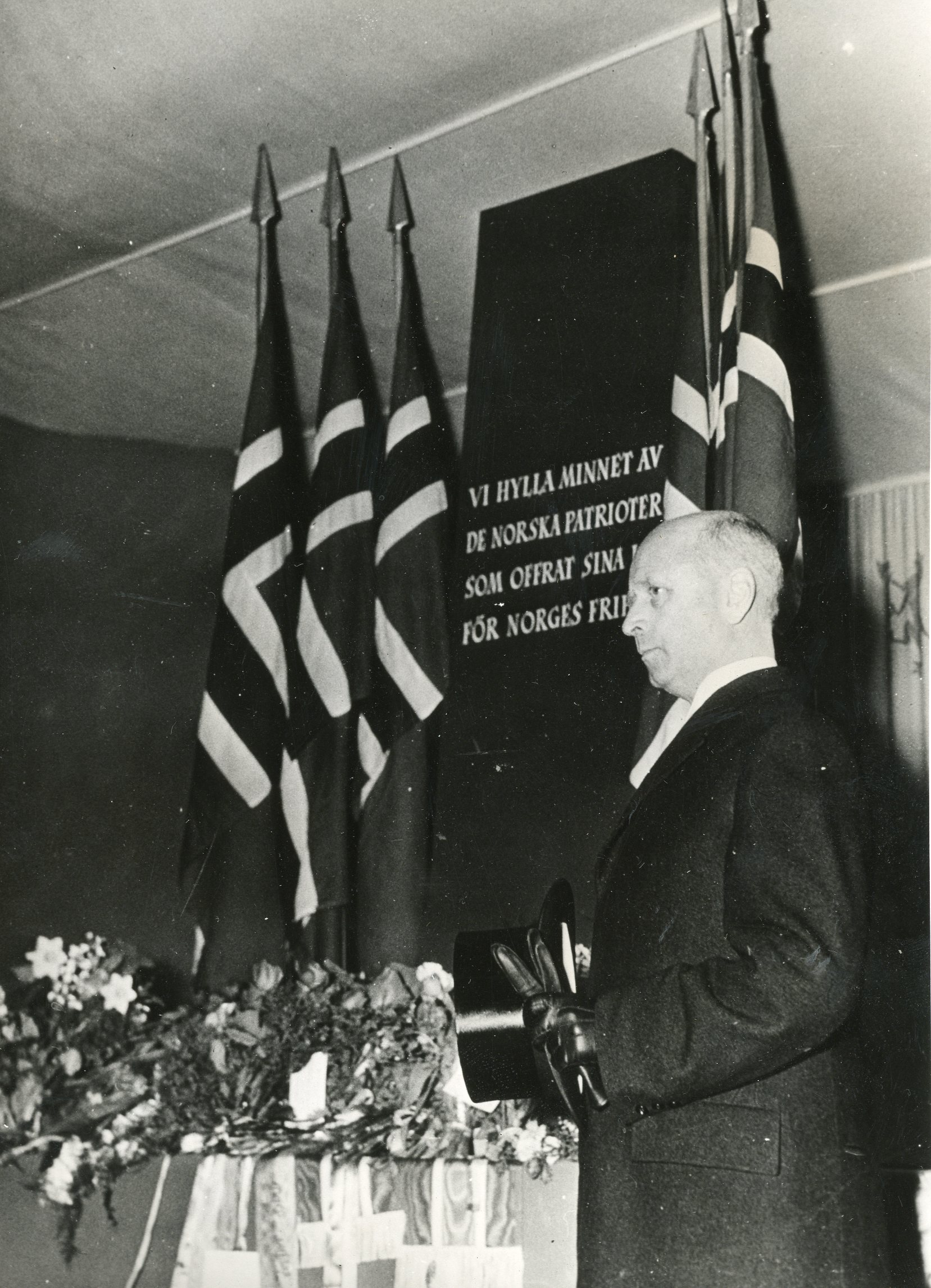 Norgesutstillingen i Stockholm våren 1943 Fra høytideligheten 9. April da det ble nedlagt en rekke kranser på minnesmerket over de nordmenn som har ofret sitt liv. Den norske minister i Stockholm, Jens Bull, taler på Norges vegne. RA/PA-1209/Uc/66/4/L 6634